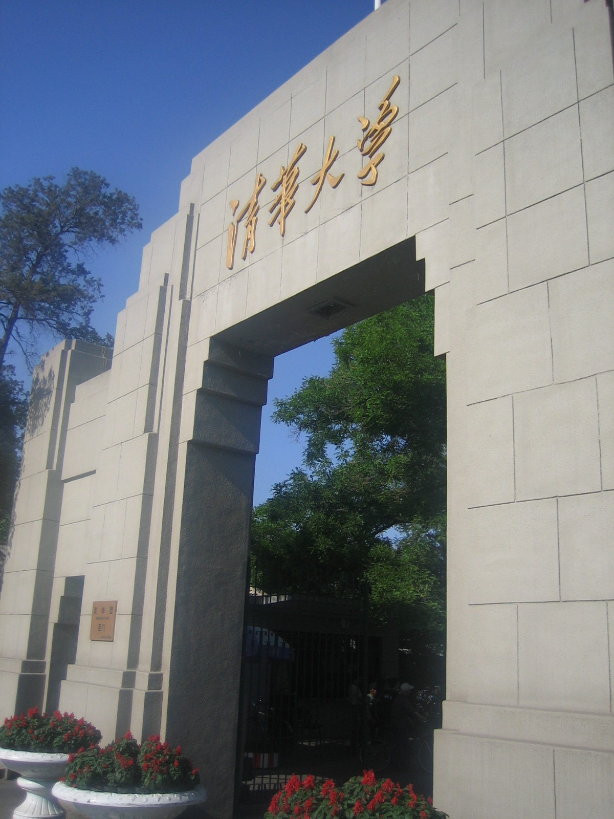 清華大學西校門